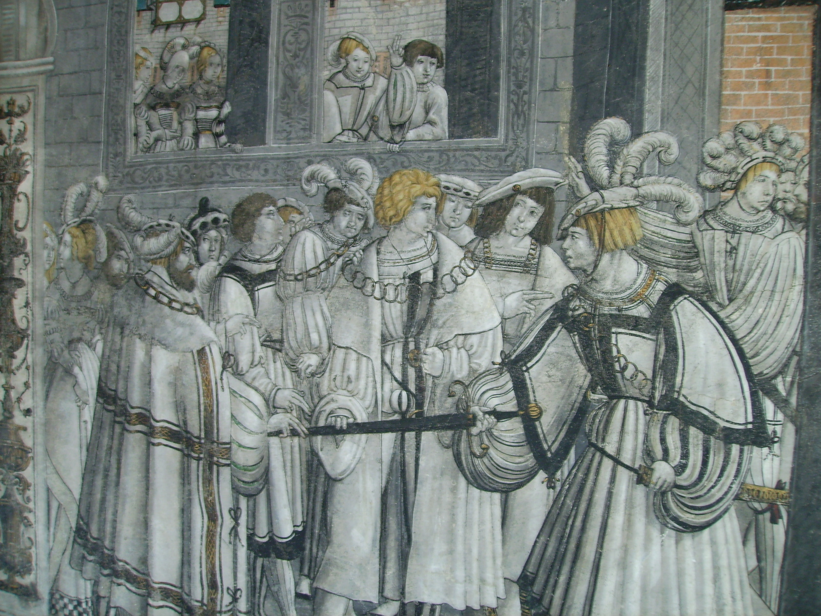 Das Kloster St. Georgen war eine Benediktinerabtei in Stein am Rhein im Kanton Schaffhausen, Schweiz. Schutzpatrone des Klosters waren St. Georg und St. Cyrill. Es handelt sich um eine der am besten erhaltenen mittelalterlichen Klosteranlagen der Schweiz.